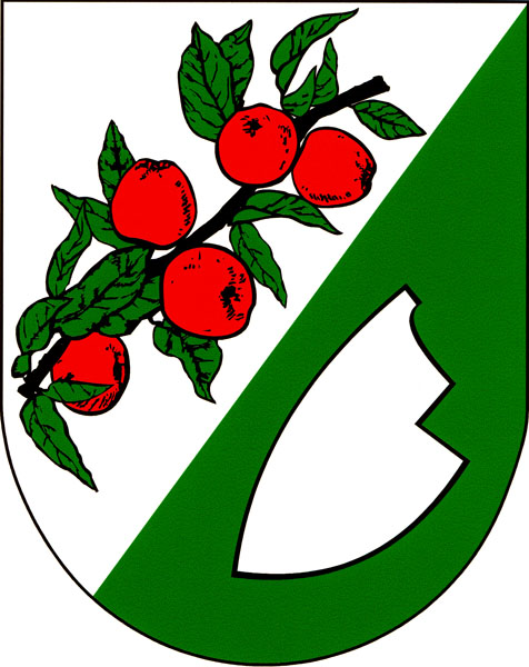 Znak obce Žďárná